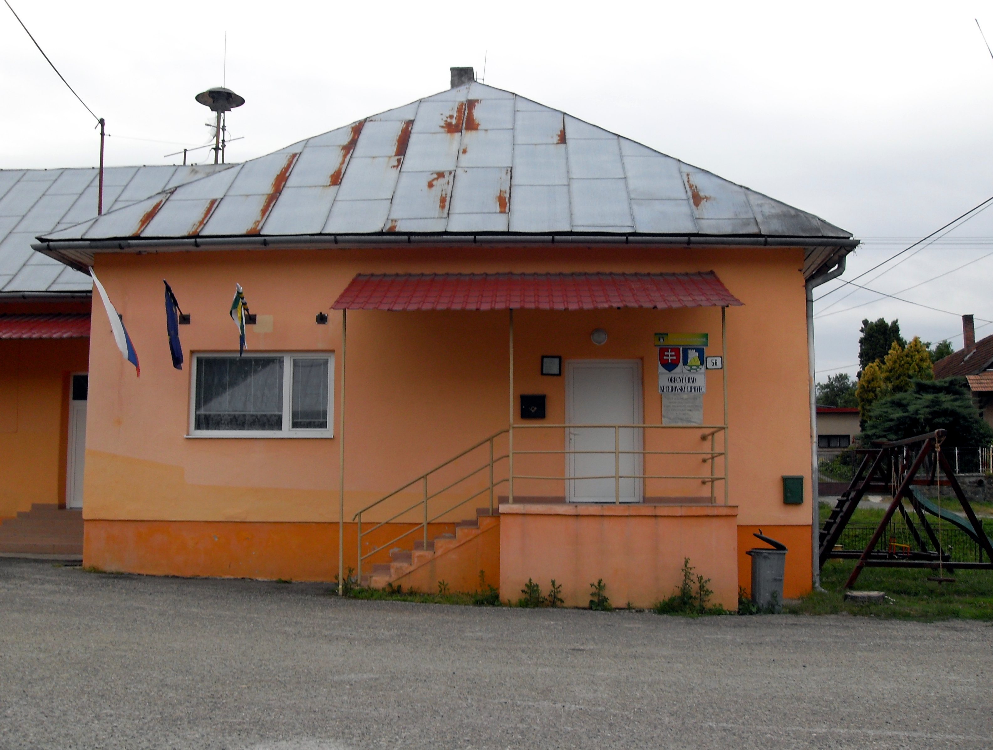 Obecný úrad v Kecerovský Lipovec